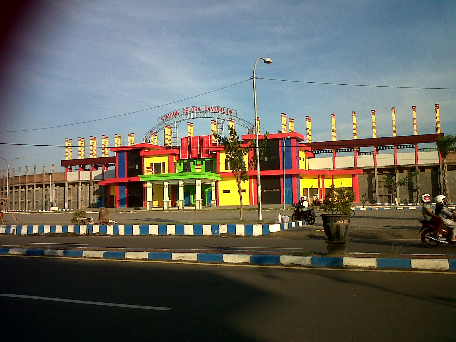 stadion gelora bangkalan